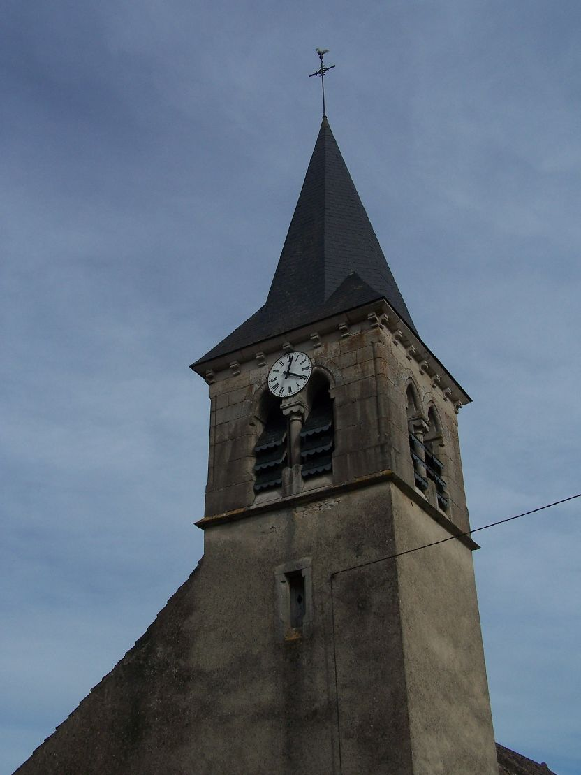 église de BOUZE les BEAUNE 21